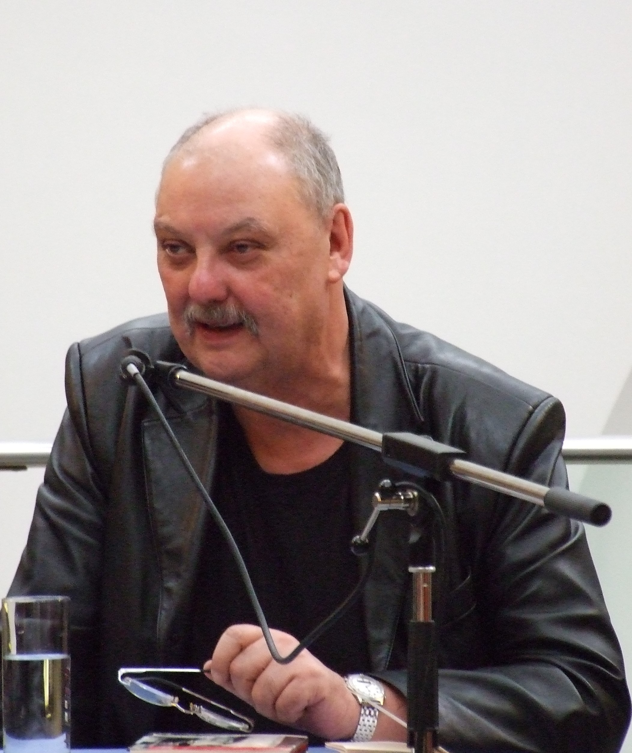 Frank Goehre bei einer oeffentlichen Lesung in Ffm